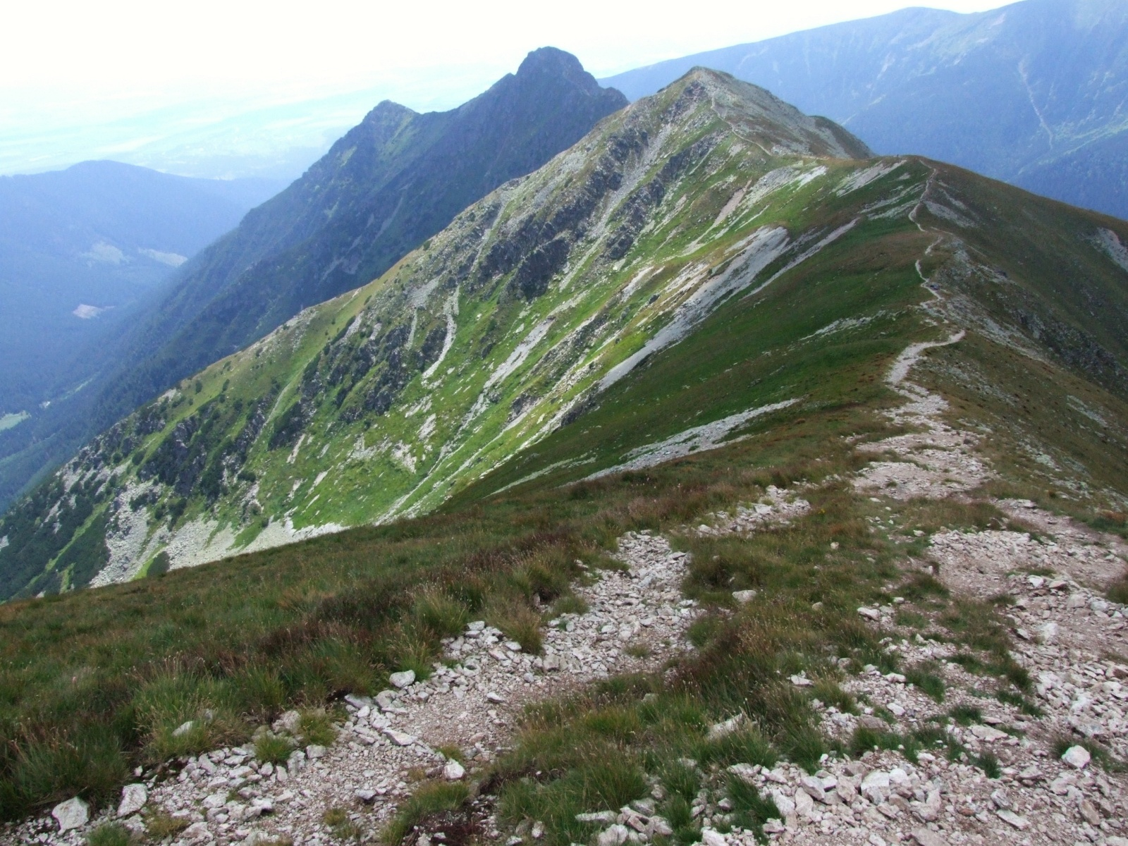 Otargańce (Tatry Zachodnie). Od lewej: Niżnia Magura, Pośrednia Magura, Wyżnia Magura